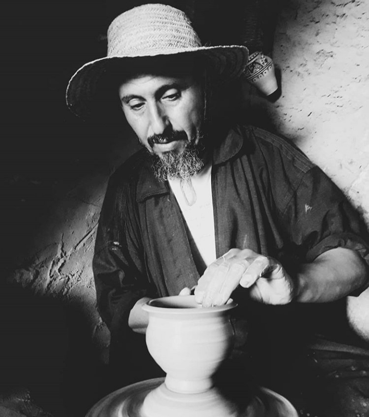 l'art de la poterie